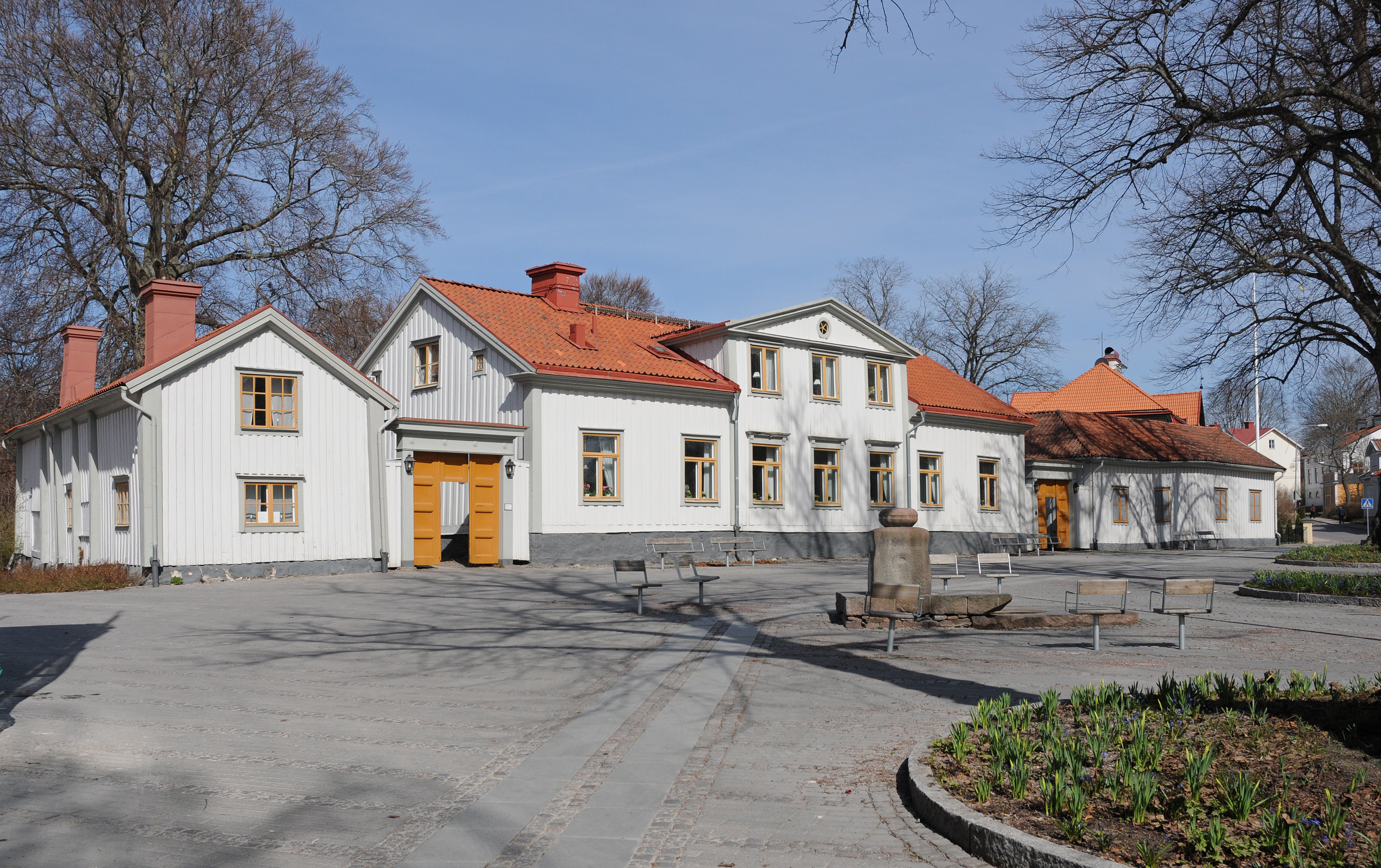 Prosten Phils gård i Nyköping